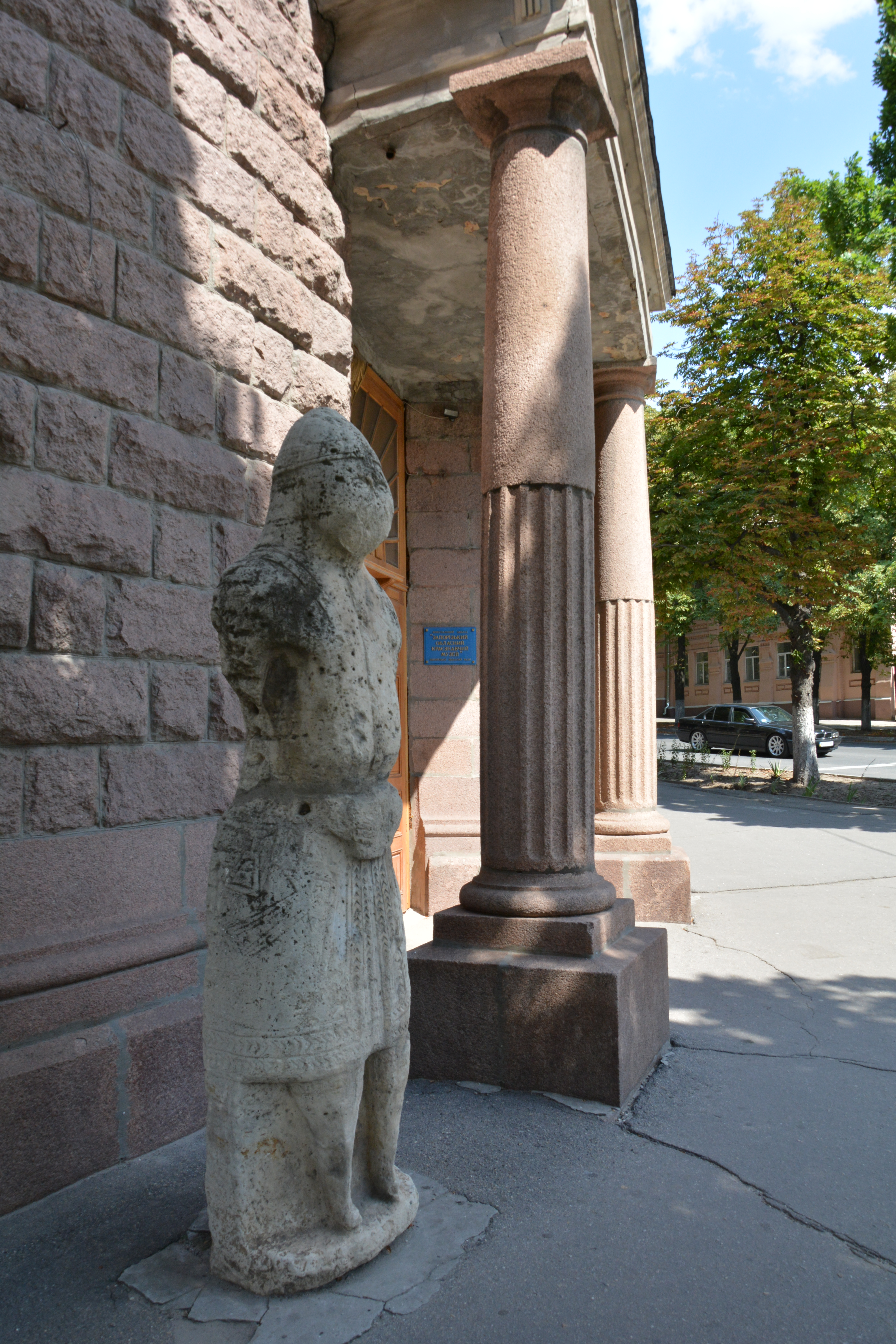 Дворянське зібрання (мур.), де розміщувався штаб 13-ї Армії Південного фронту (нині Запорізький краєзнавчий музей), Запоріжжя, вул. Чекістів, 29